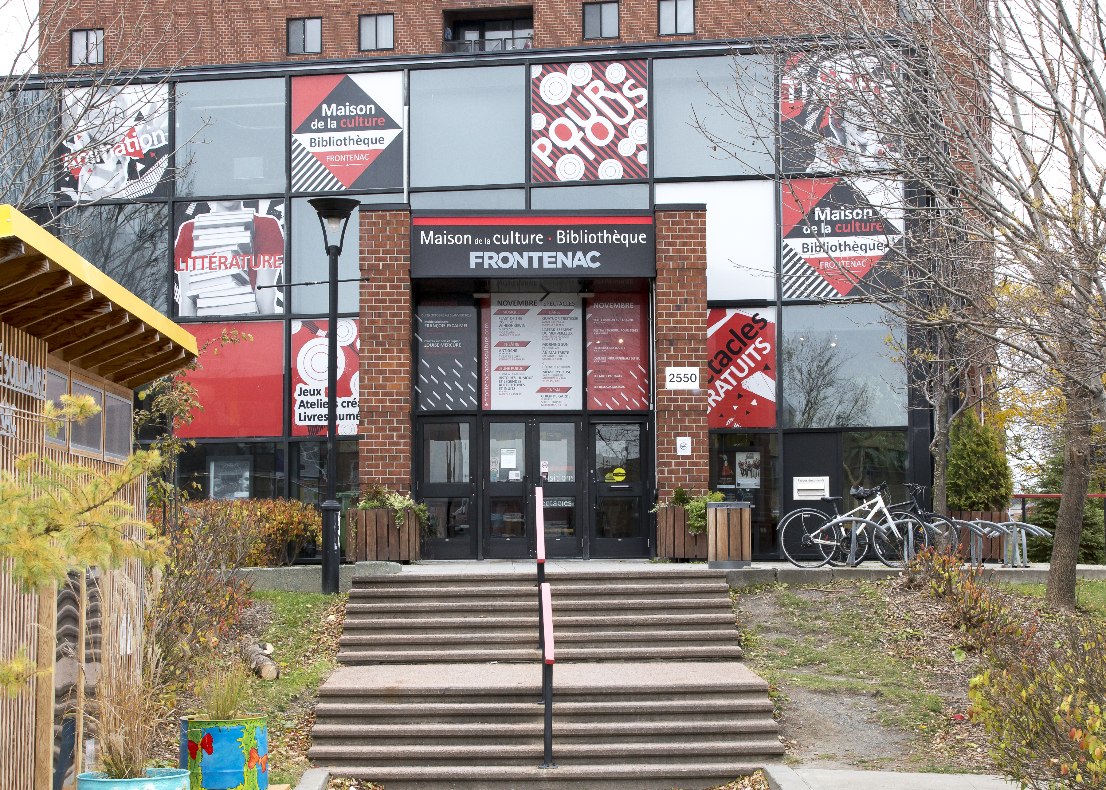 Photo par Louis-Étienne Doré